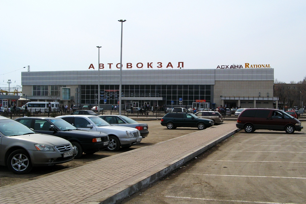 Автовокзал